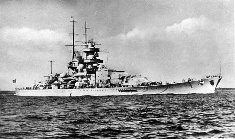 Schlachtschiff "Gneisenau" Schlachtschiff "Gneisenau"